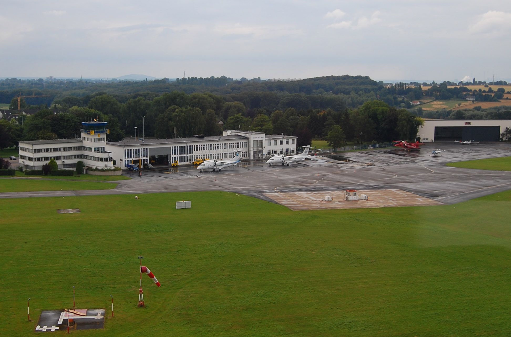 Luftbild des Flughafens Essen-Mülheime